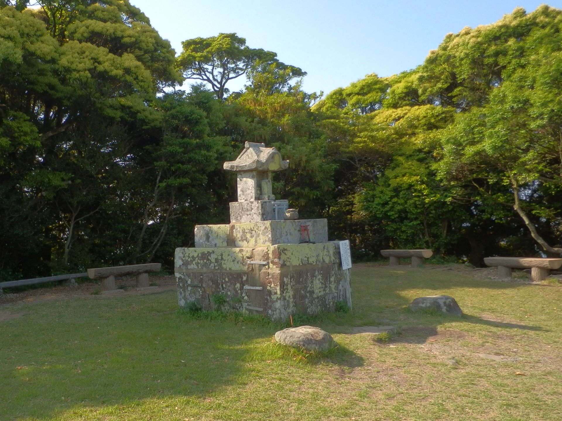 長崎市の岩屋山の山頂広場。